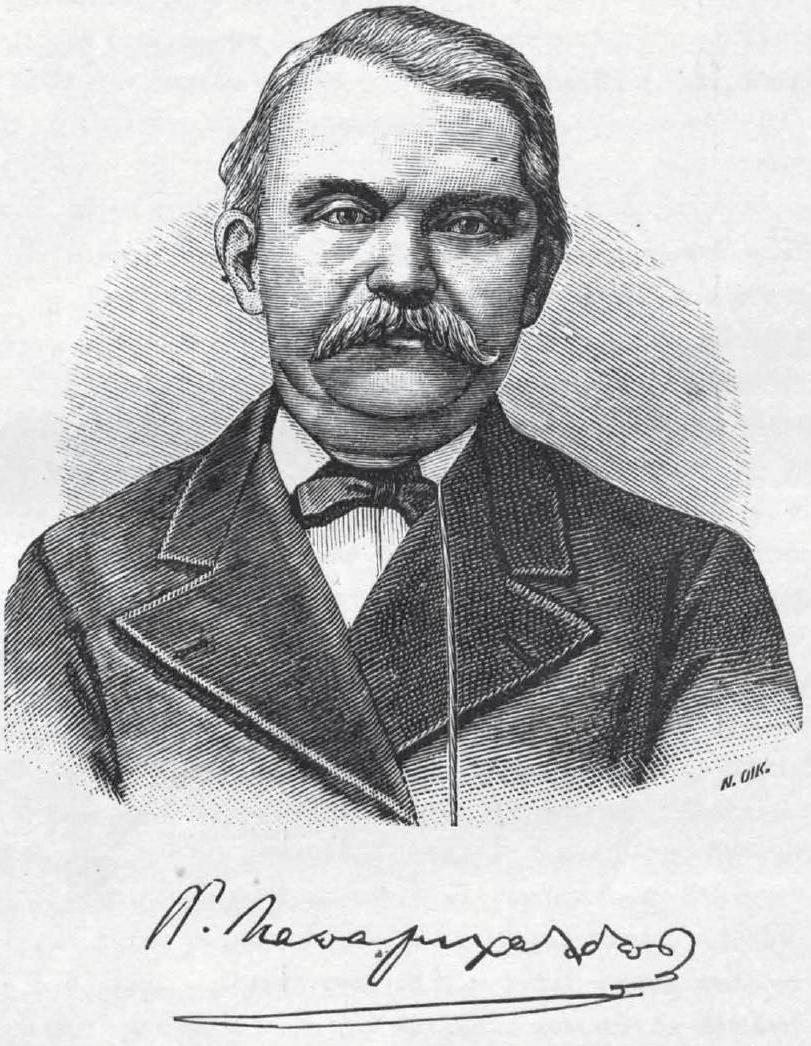 Parlamentspräsident, Griechenland, 19. Jahrhundert.